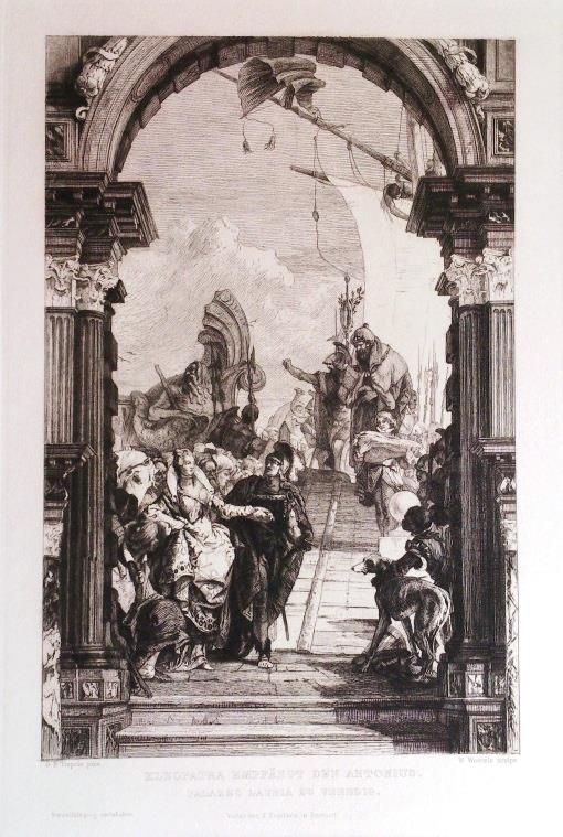 Reproduktion des Gemäldes von Tiepolo als Radierung, ausgeführt von Wilhelm Woernle